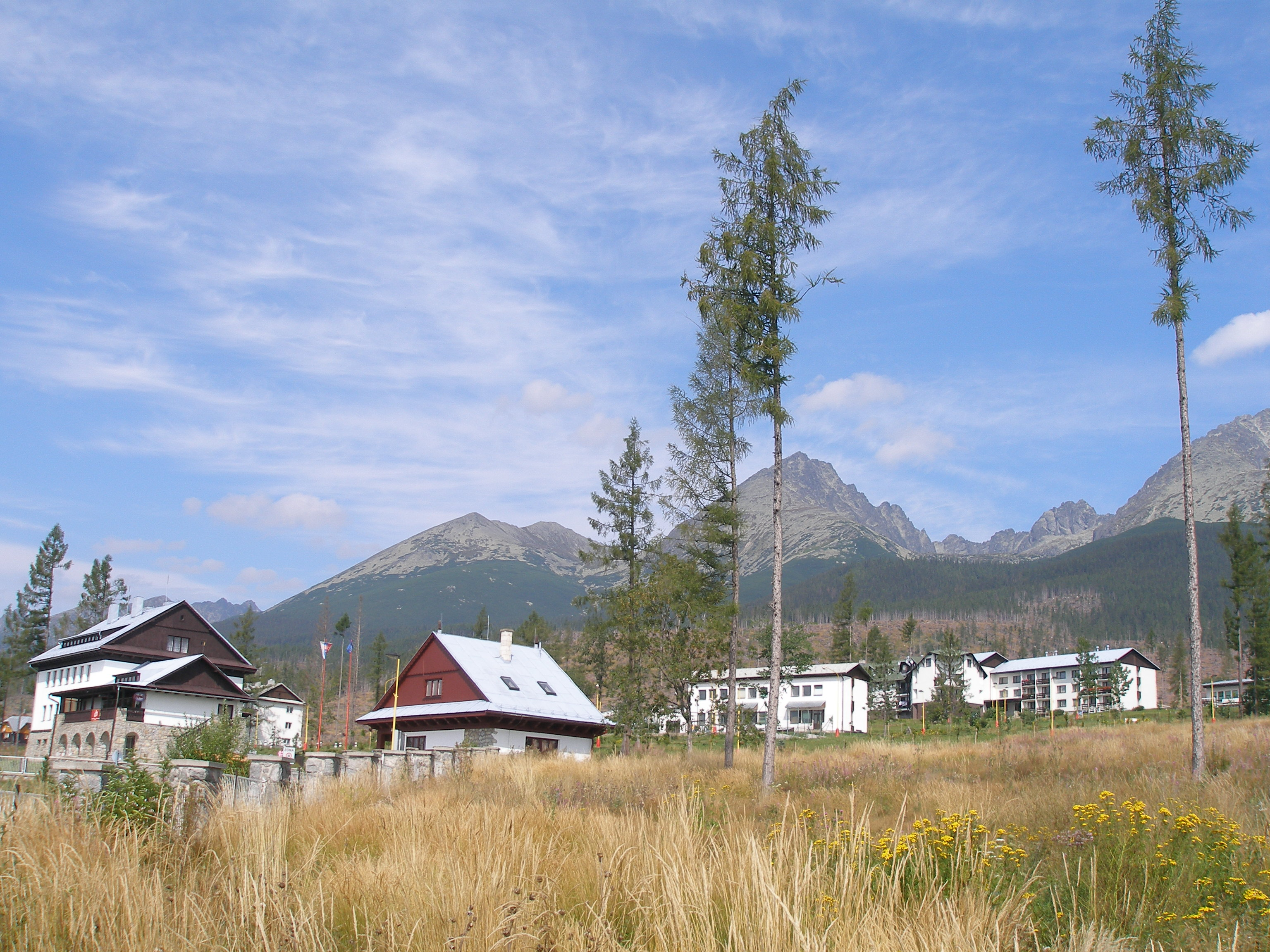 Tatranská osada Nová Polianka vojenský liečebný ústav